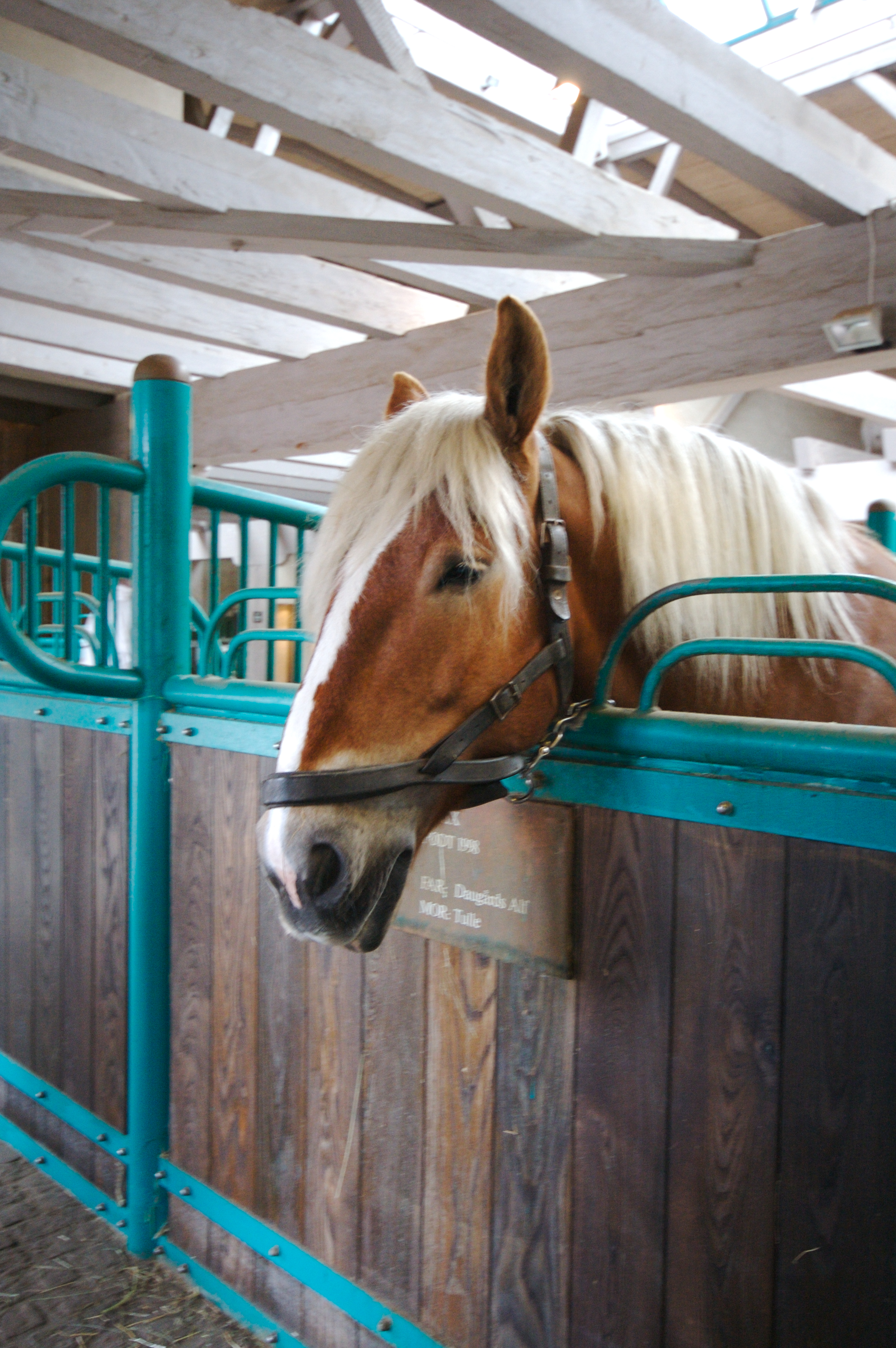 Carlsberg Brewery